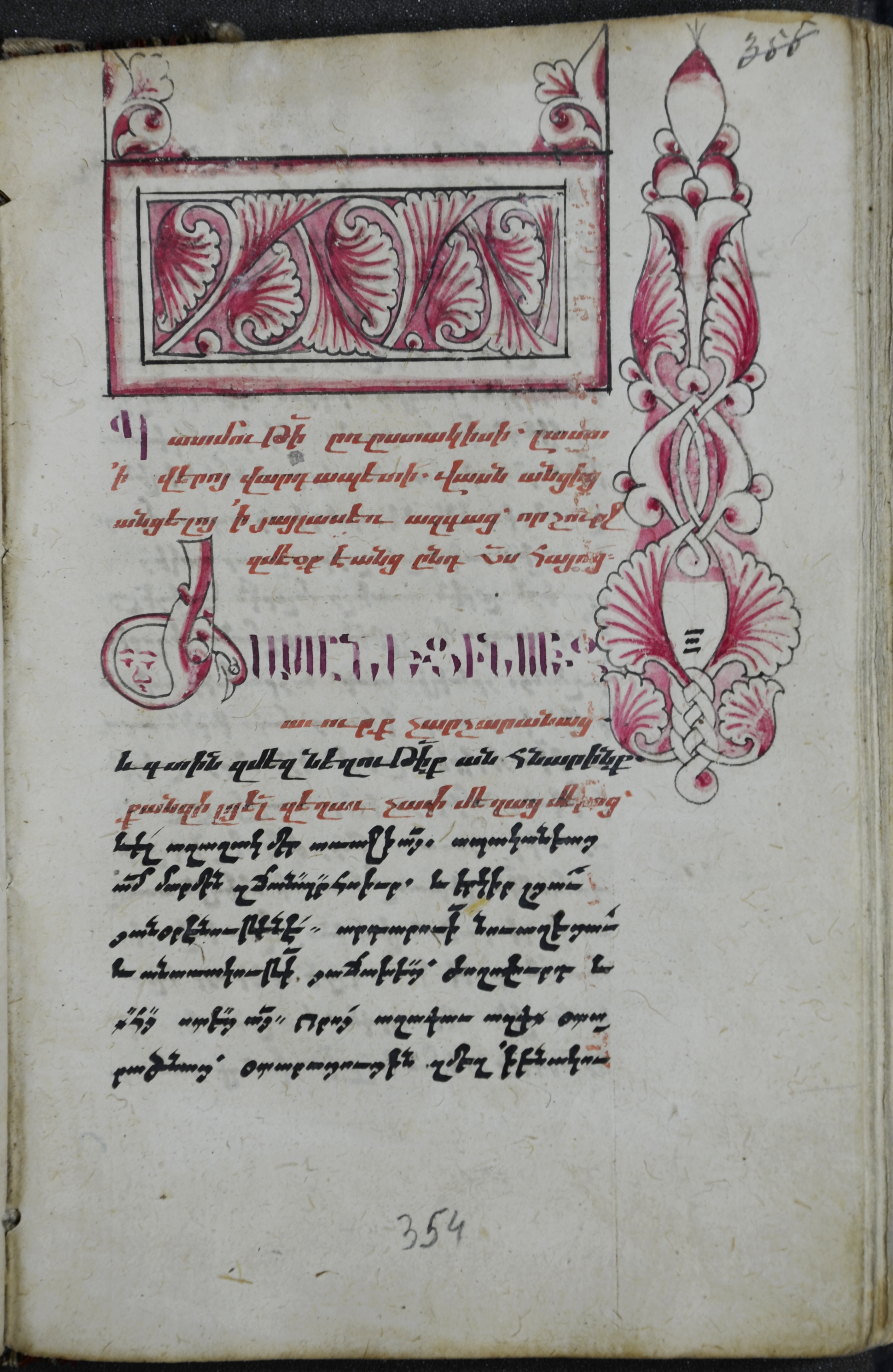 Ճակատազարդ, լուսանցազարդ, Երևան, 1658-1663 թթ. ՄՄ 3502-354ա